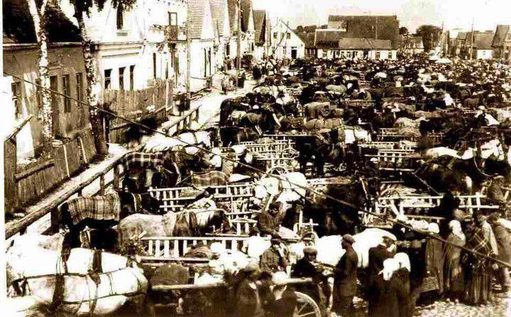 Беларуская (тарашкевіца): Эйшышкі (Ejšyški), пляц Рынак (plac Rynak)